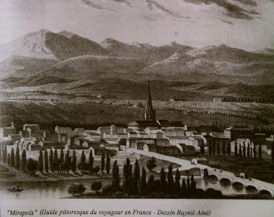 Mirepoix vue du château de Terride. Au fond, le massif de Tabe (pic de Saint-Barthélemy, du Soularac, Mont Fourcat, etc.).